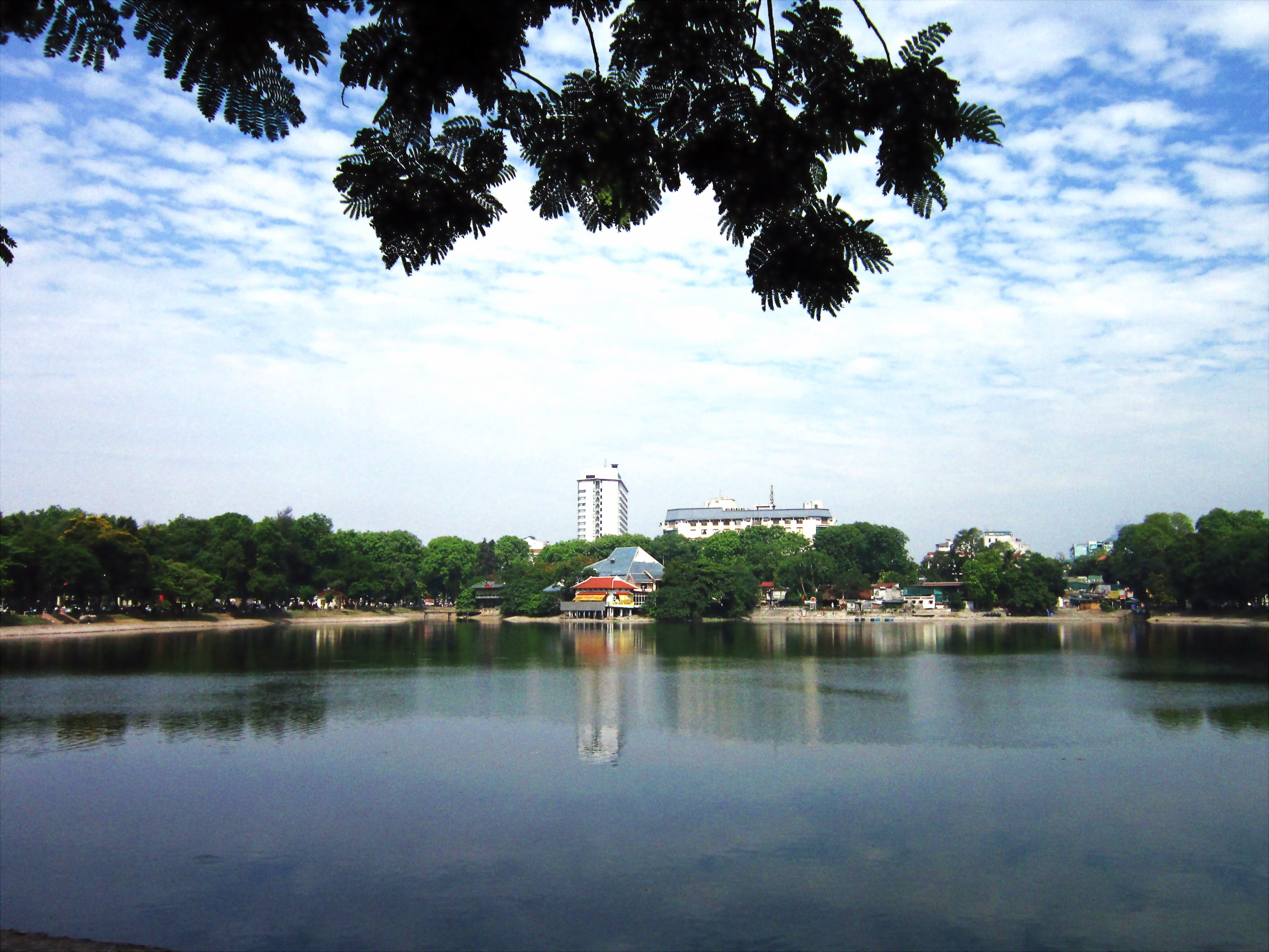 Hồ Thiền Quang ở Hà Nội, Việt Nam.